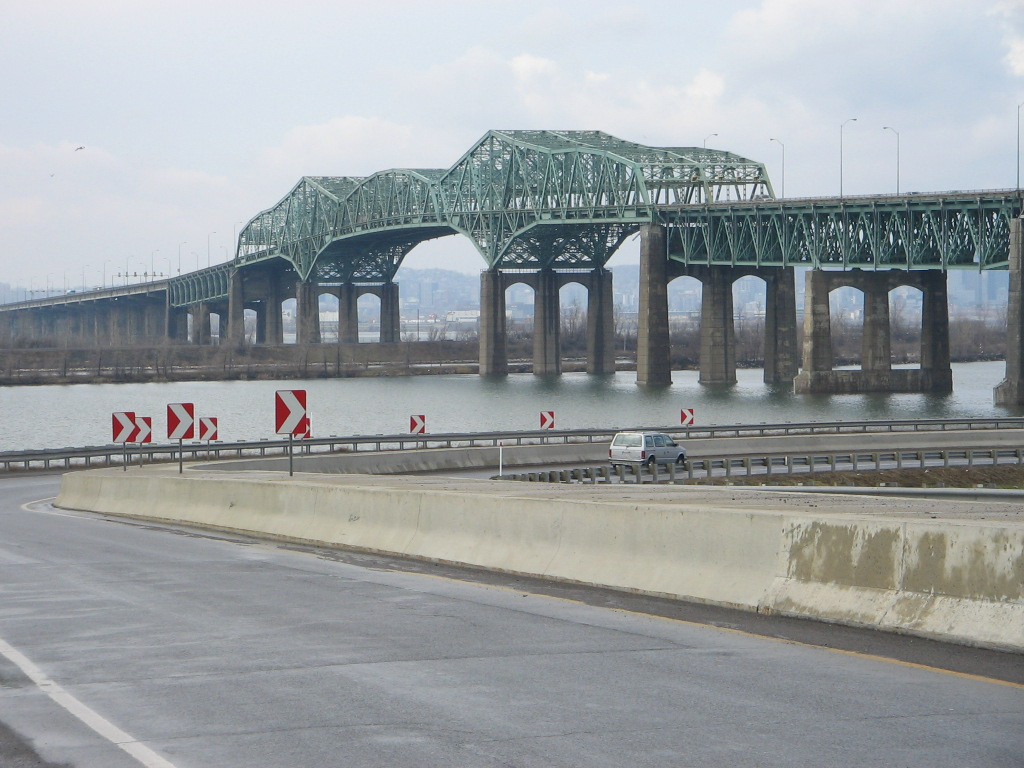 Photo du pont Champlain de Montréal.